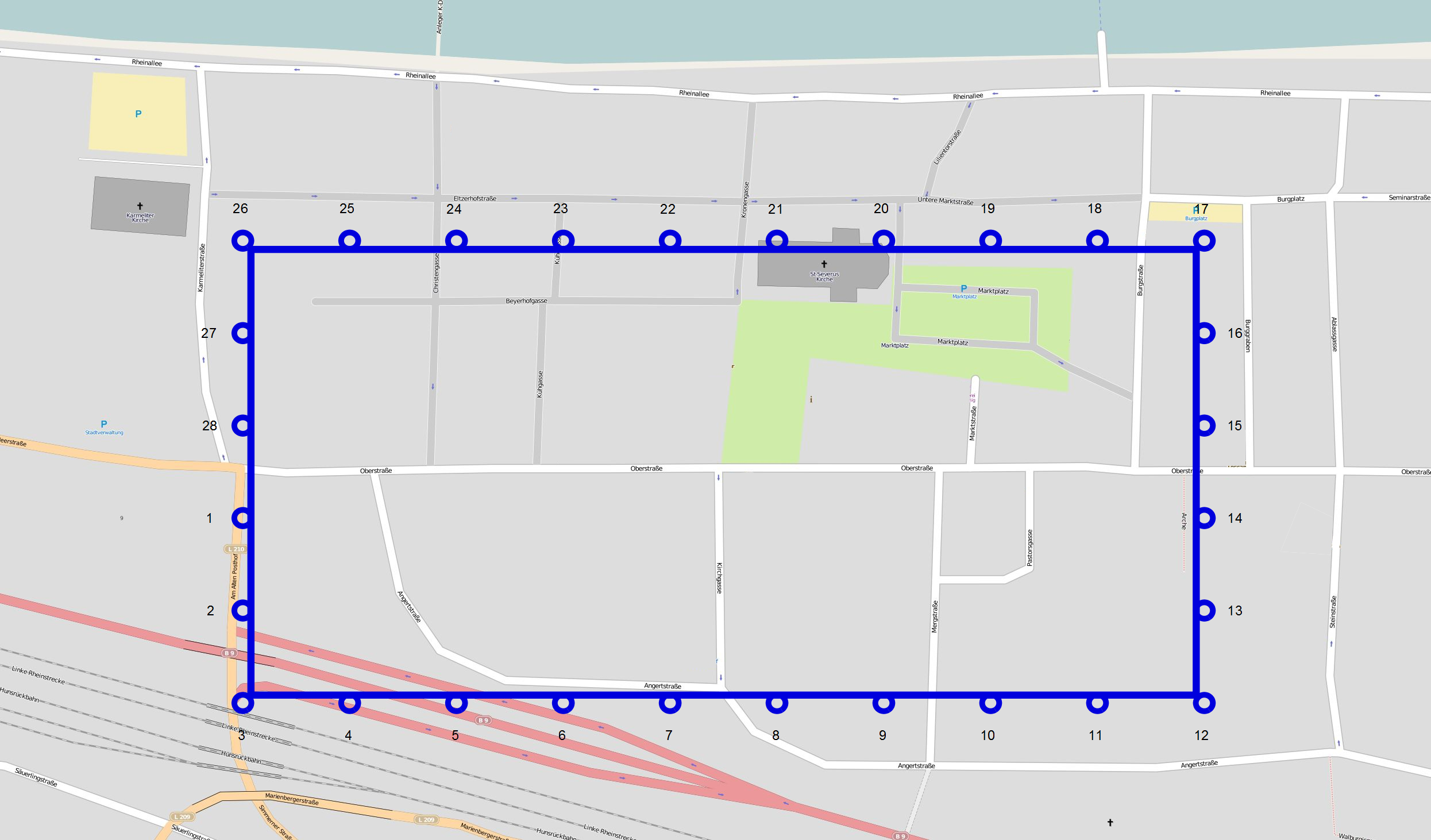 Lage des römischen Kastells in Boppard mit Nummerierung der Türme